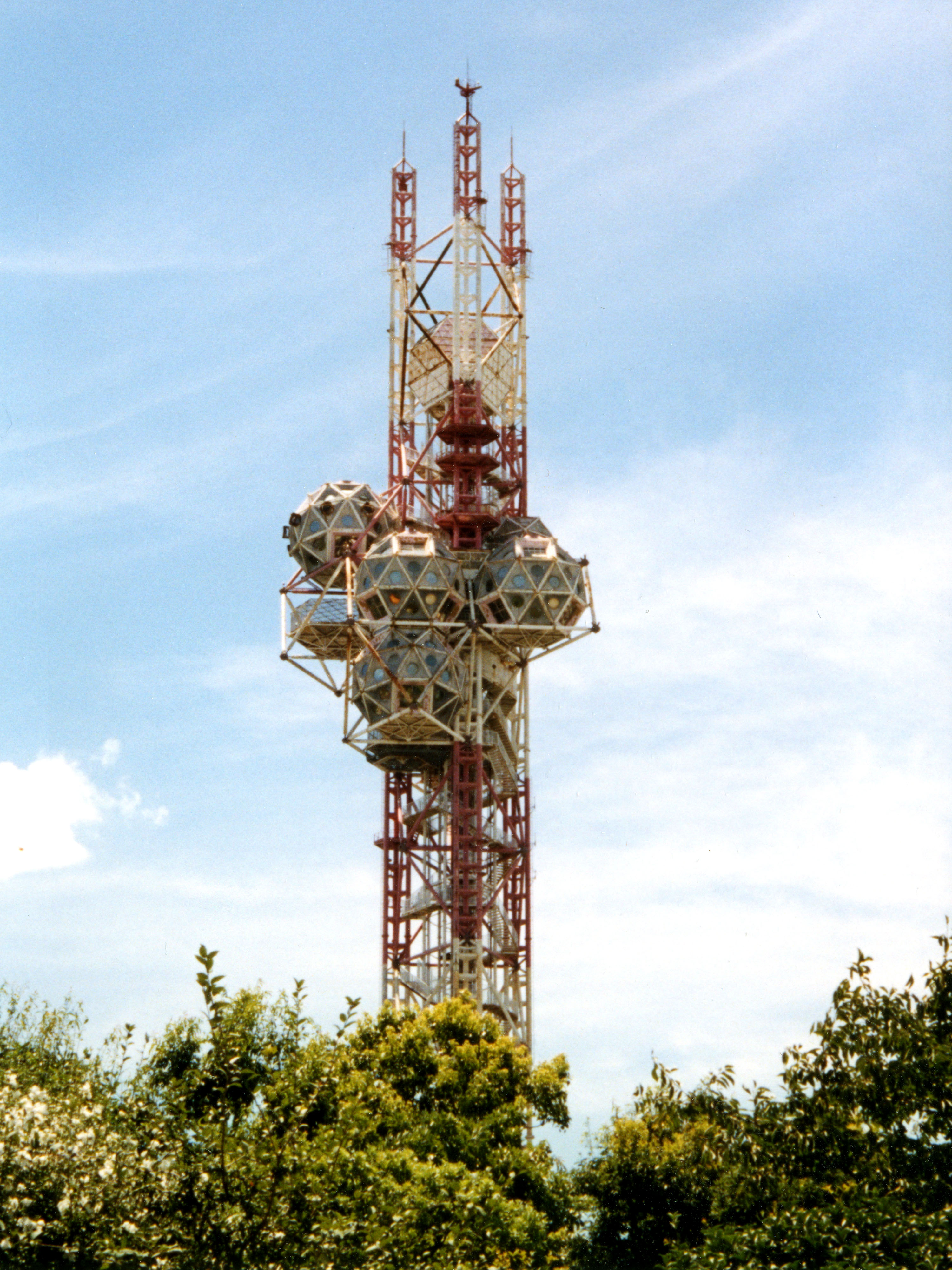 EXPO TOWER, Senribanpakukoen Suita-City Osaka Japan.